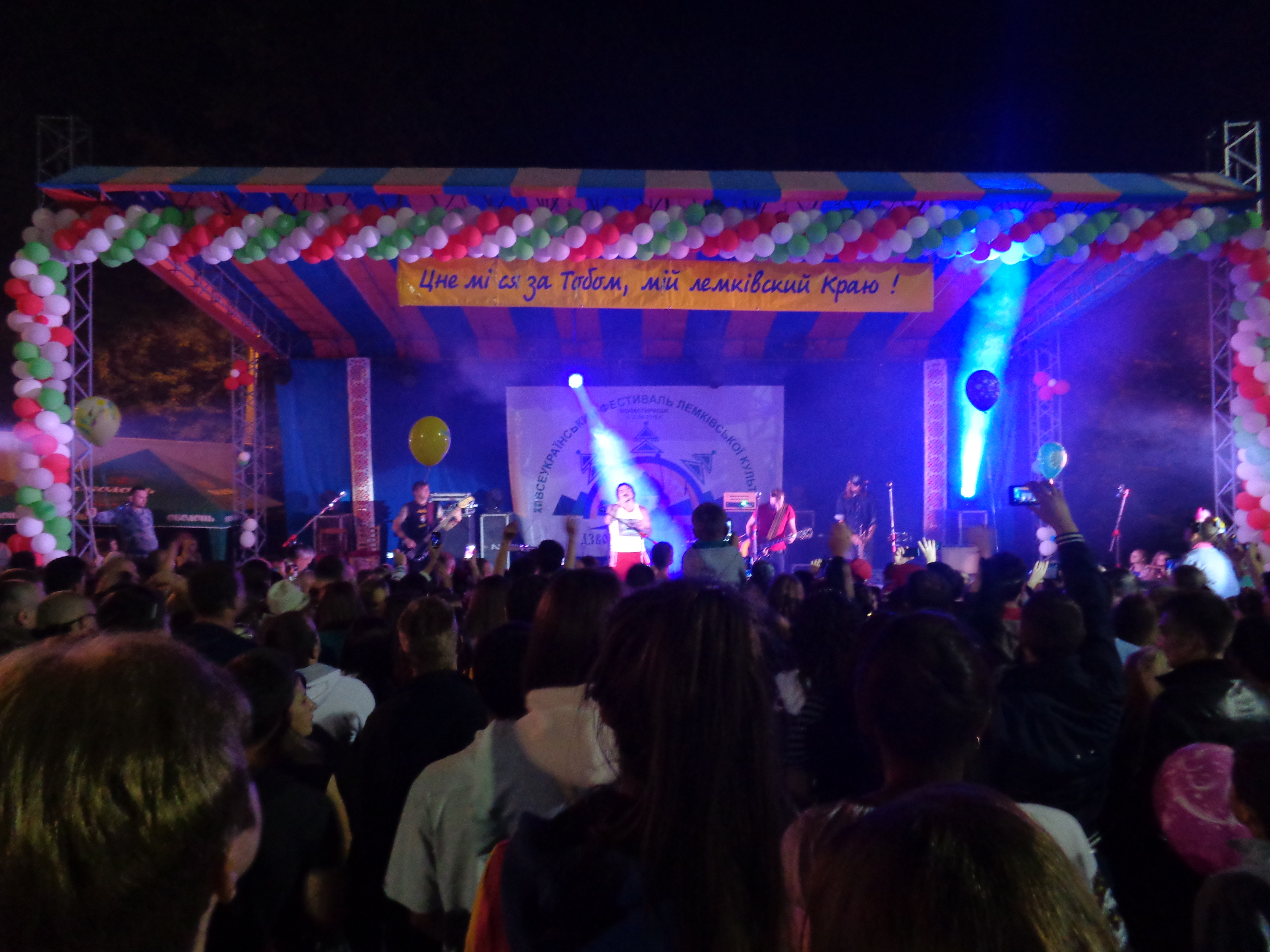 "Kozak System" на фестивалі лемківської культури "Дзвони Лемківщини".